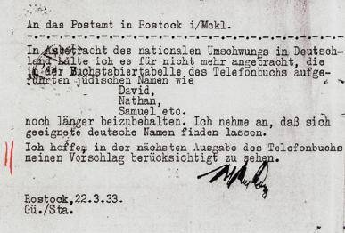 Brief Joh. Schliemanns an das Postamt von Rostock von 1933, in dem die "Arisierung" des Telefonalphabets gefordert wird.